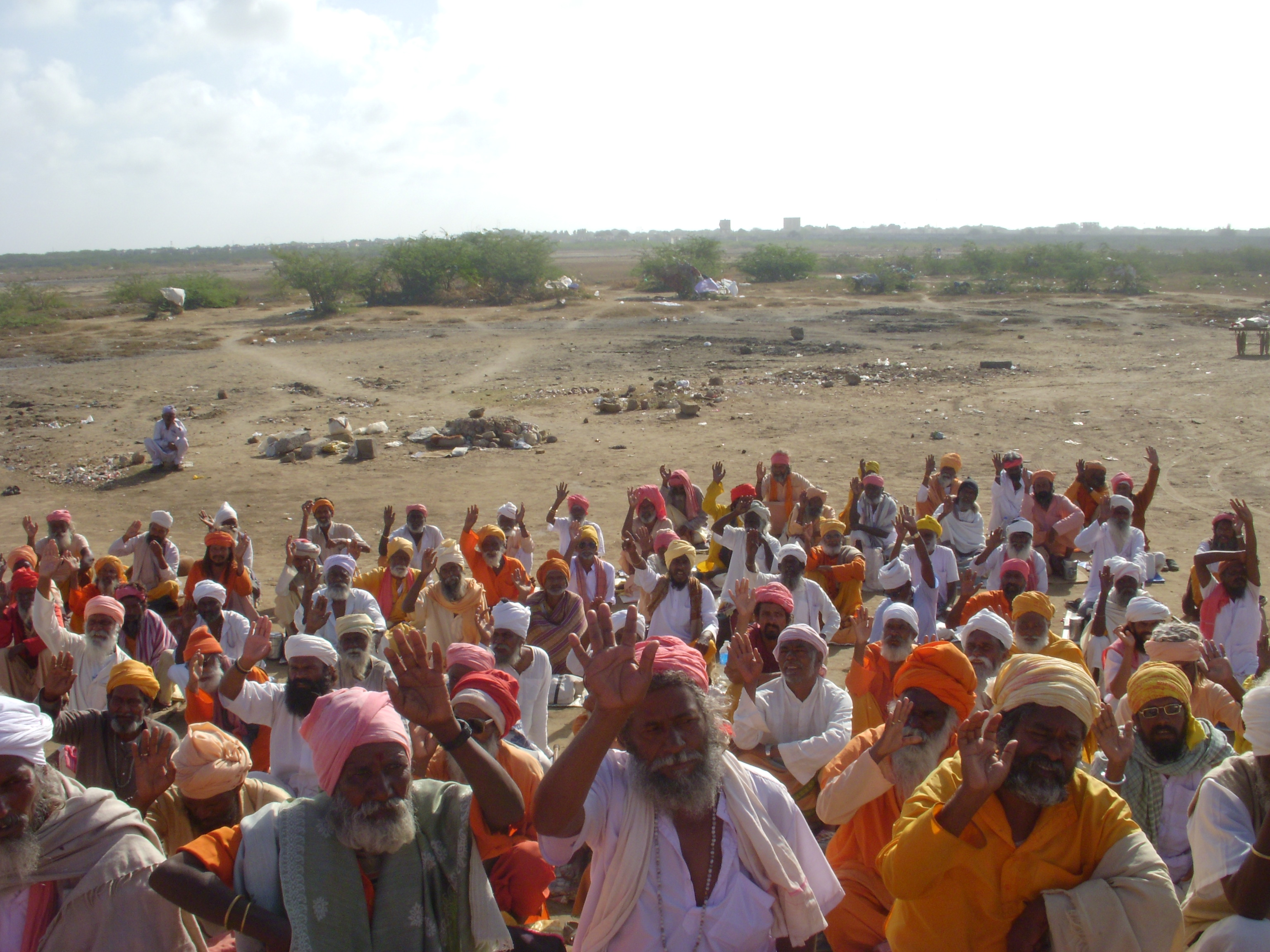 రుక్మిణీ మందిరం సమీపంలో భిక్షువులు